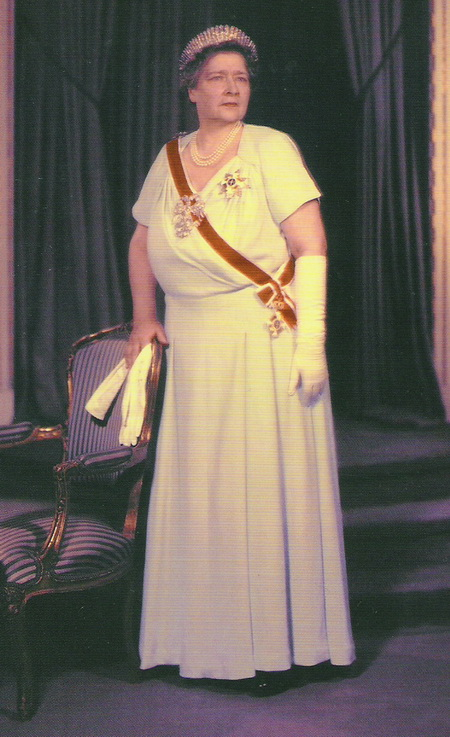 Queen Maria of Yugoslavia